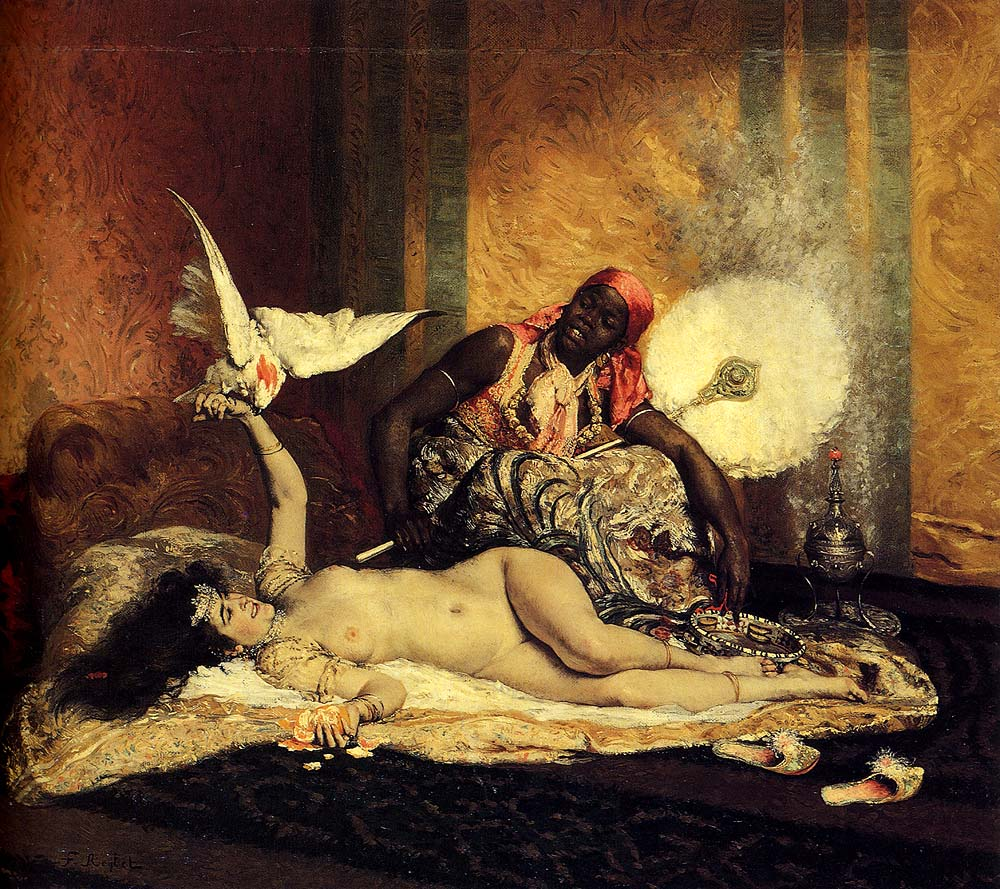 Odalisque (La Sultane)